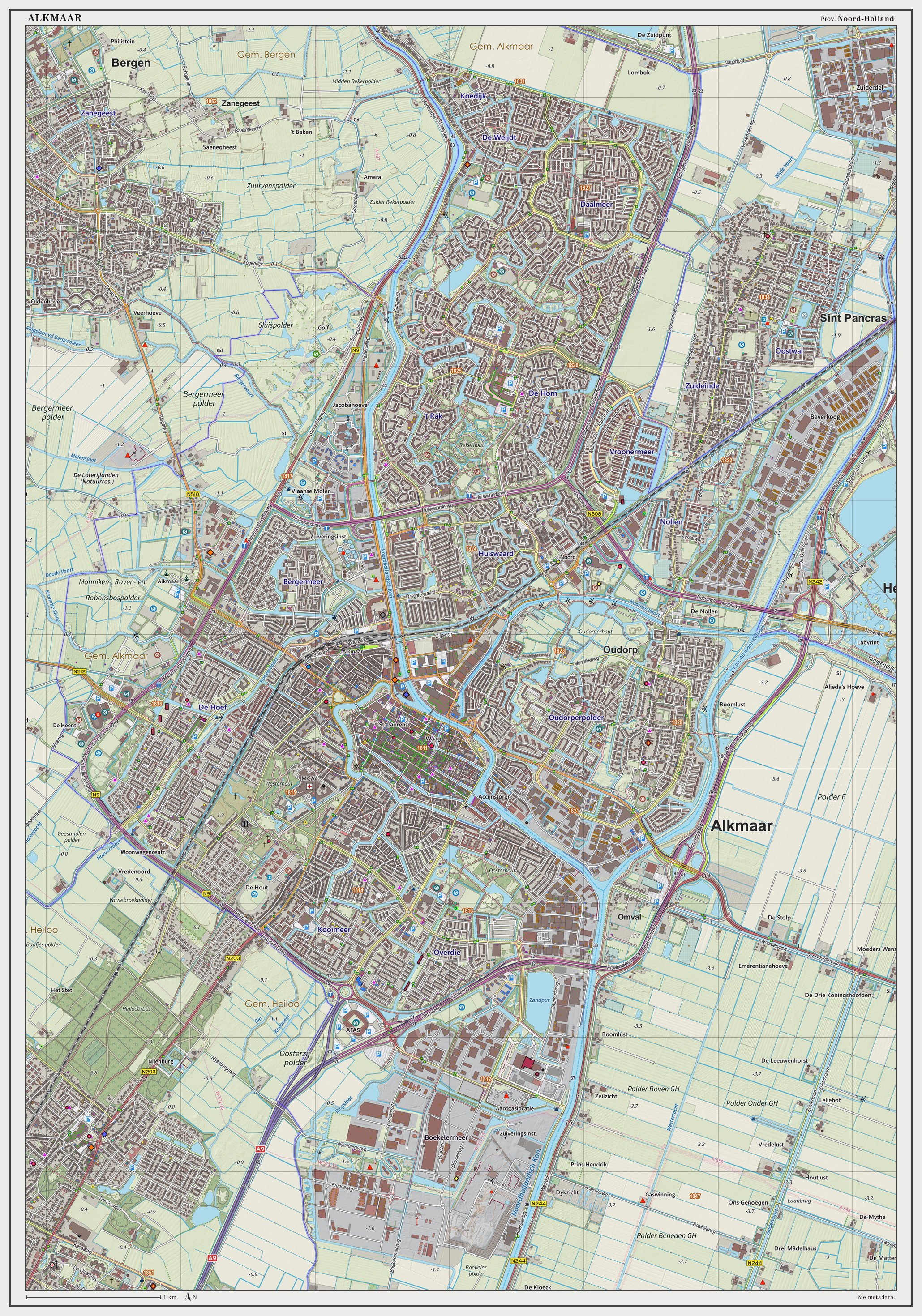 Topografische kaart van Alkmaar (woonplaats). Resolutie: 300 pixels/km. Kaartbeeld samengesteld uit de open geodata van de Top10NL en Top25namen (Basisregistratie Topografie, Kadaster), Creative Commons BY licentie. Gebouwvlakken uit open geodata BAG extract. Wegen uit de OpenStreetMap, OpenStreetMap community. Schaduwreliëf uit de Actuele Hoogtekaart AHN2. Samenstelling en kleurenschema: Jan-Willem van Aalst, met QGIS2. Zie ook de Legenda.